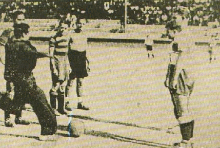 Allouch nouveau champion de France de boxe, donne le coup d'envoi du match MCA-RUA sous les regards de Berzig (maillot rayé)